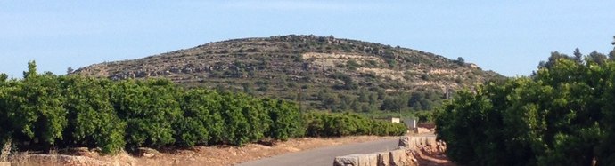 Vista de la muntanya de Farons d'Onda